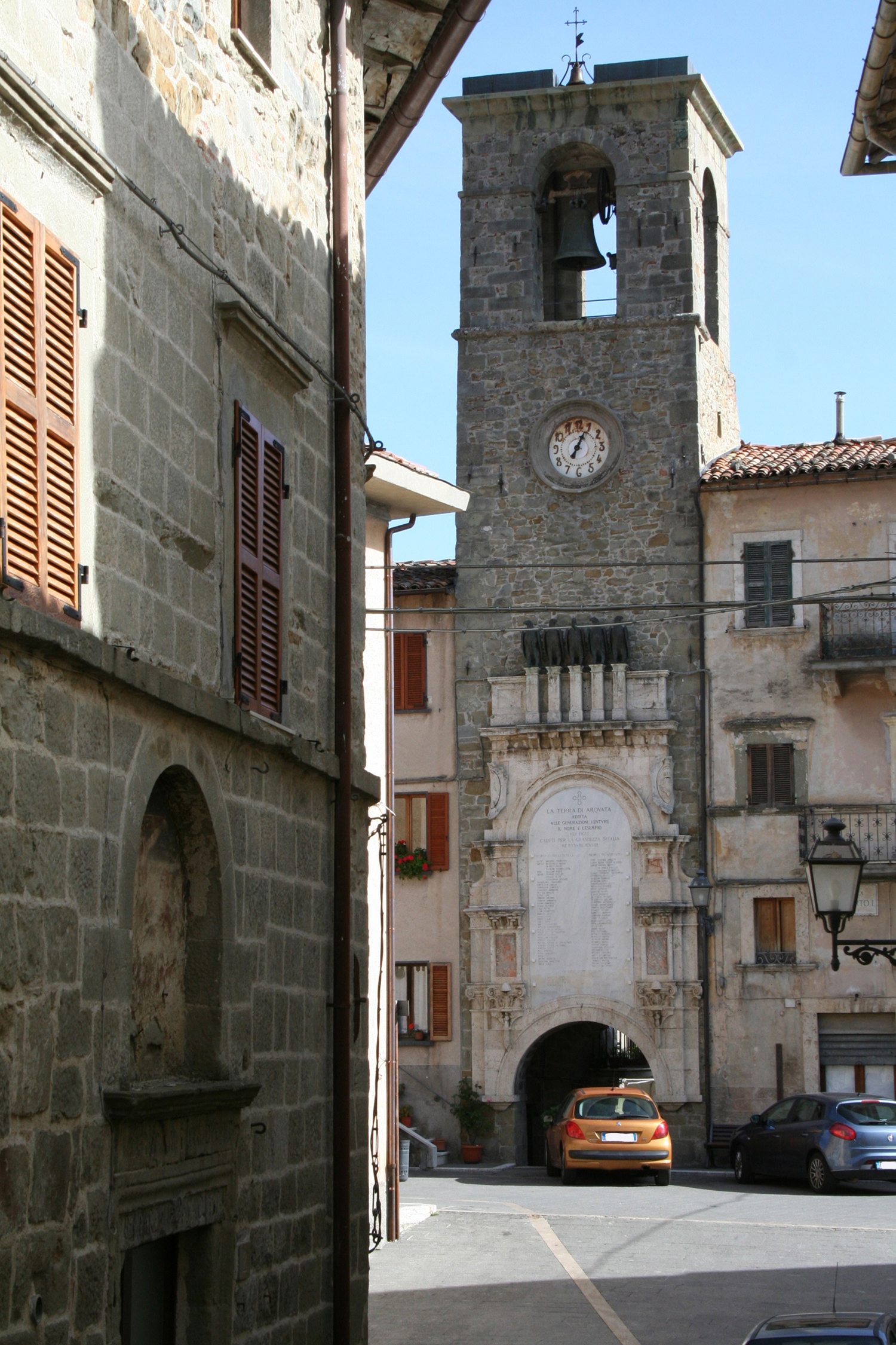 Torre civica di Arquata del Tronto, in provincia di Ascoli Piceno.